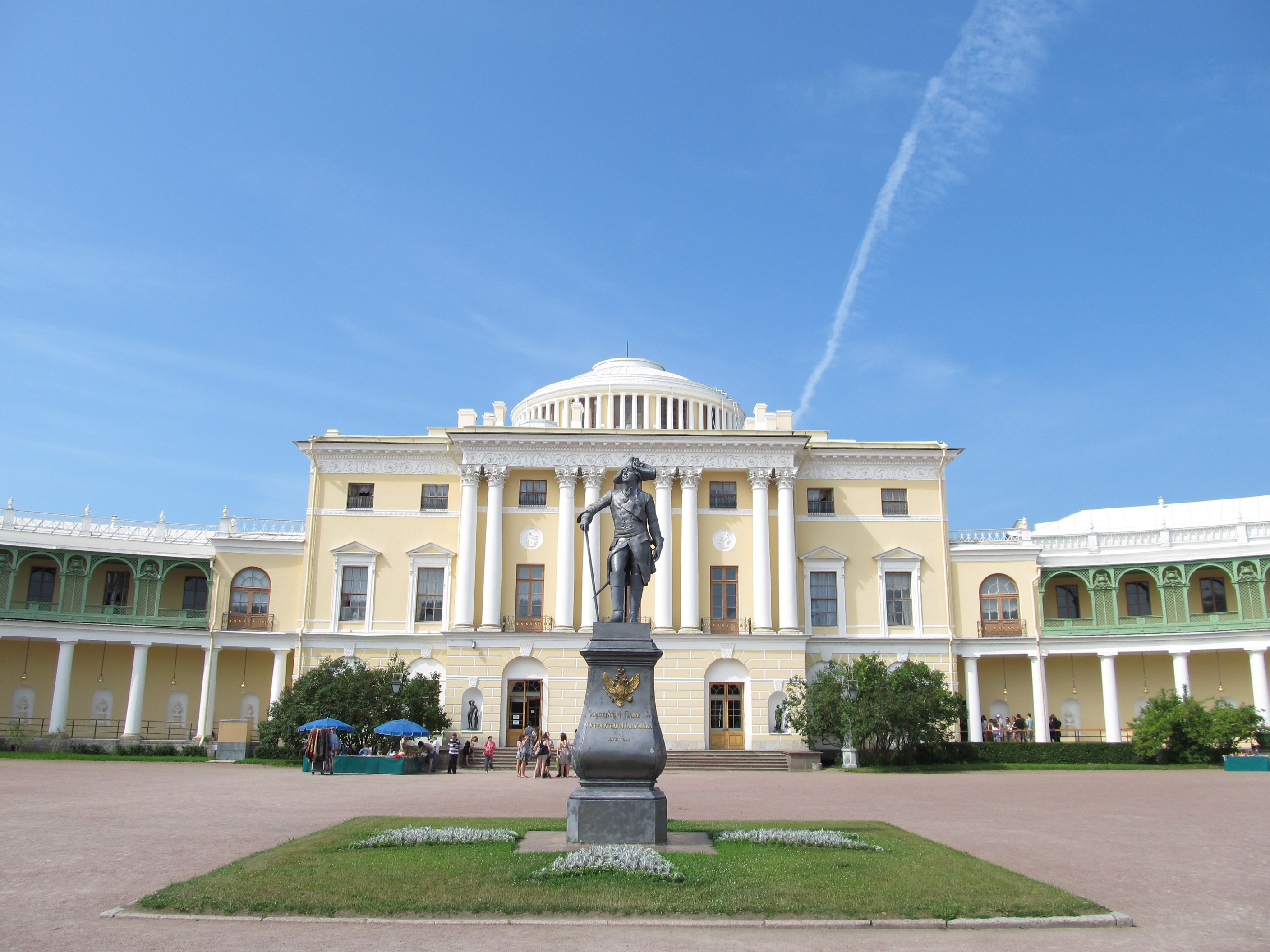 Большой Павловский дворец, памятник Павлу I